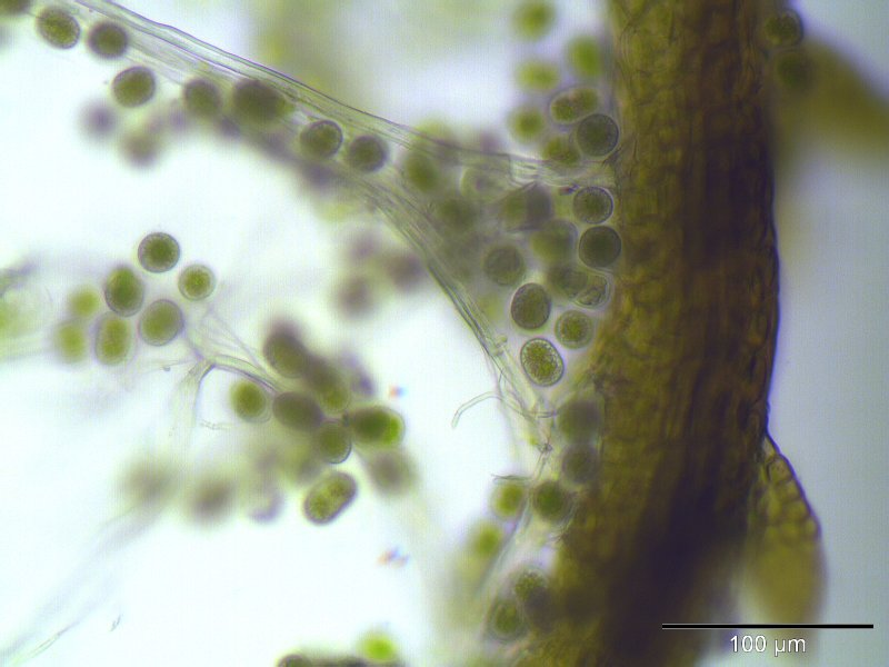 Spreizblättriges Kleinkopfsprossmoos (Cephaloziella divaricata), Rhizoide (Stolonen) mit Brutkörpern, Vergrößerung: 250x